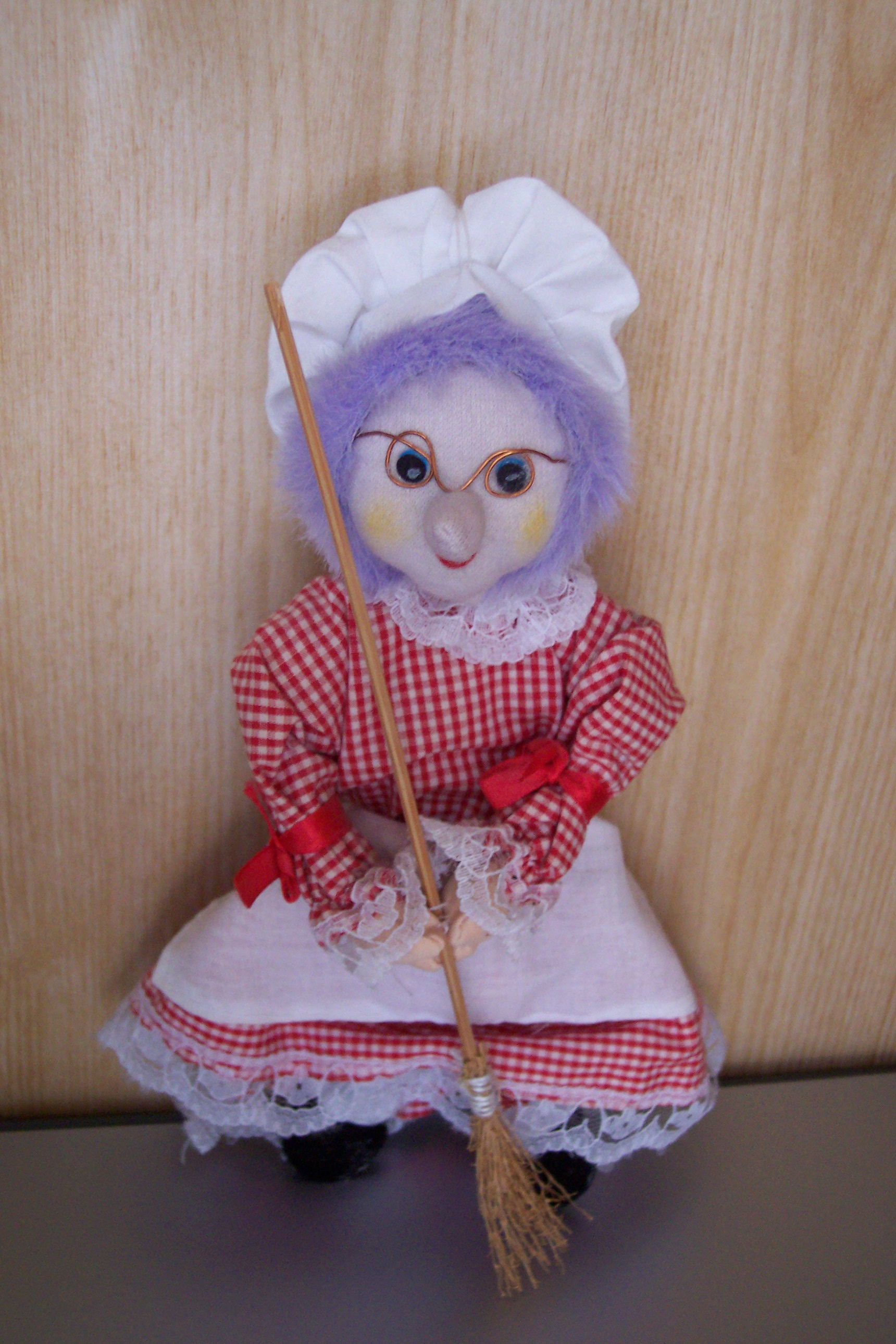 Eine Stoffpuppe einer Brockenhexe aus dem Harz